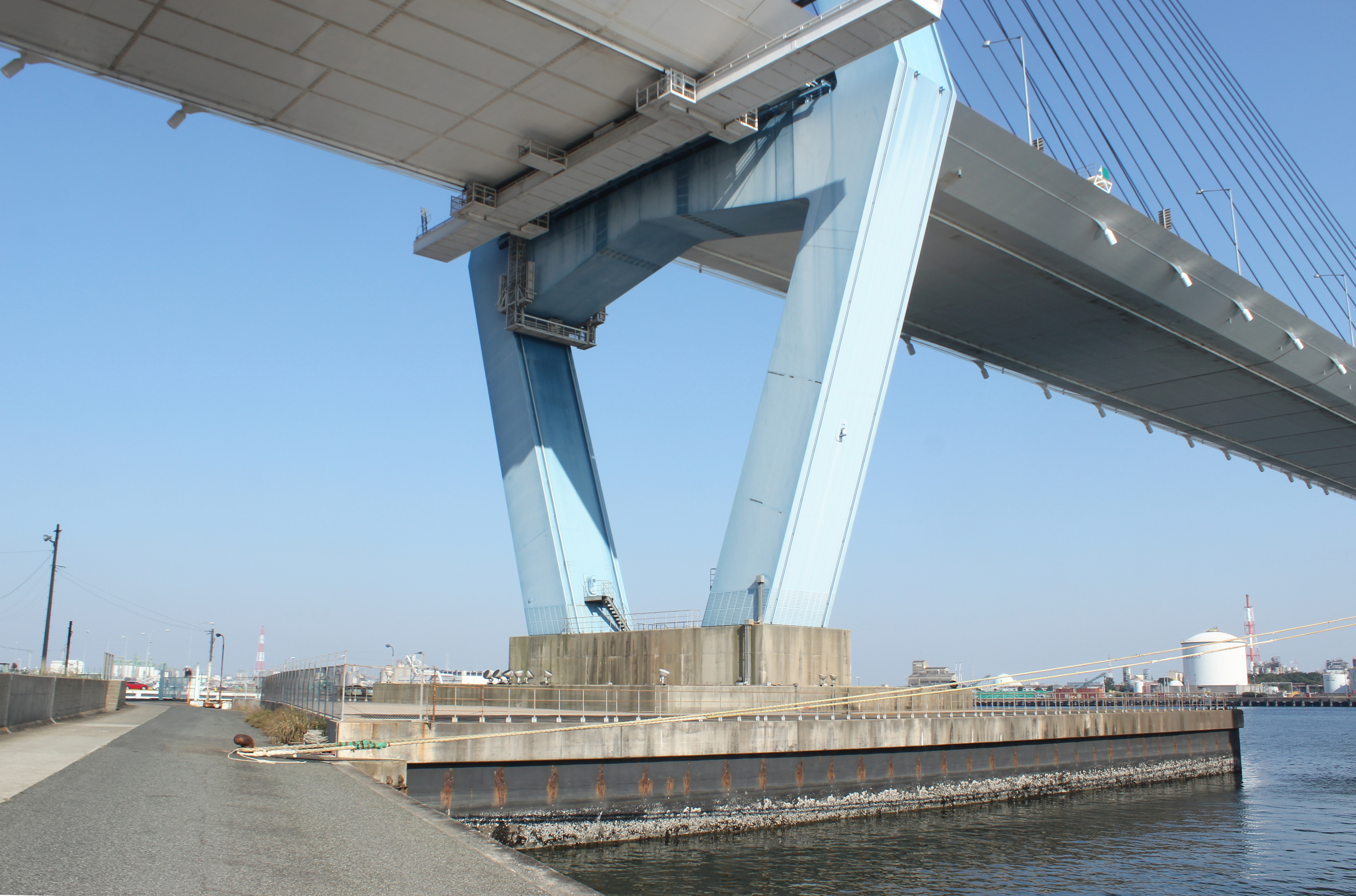 名港東大橋P-2主塔基部。潮見ふ頭の岸壁と地続きである。